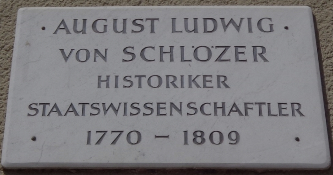 Göttinger Gedenktafel für August Ludwig von Schlözer (Paulinerstraße 19)